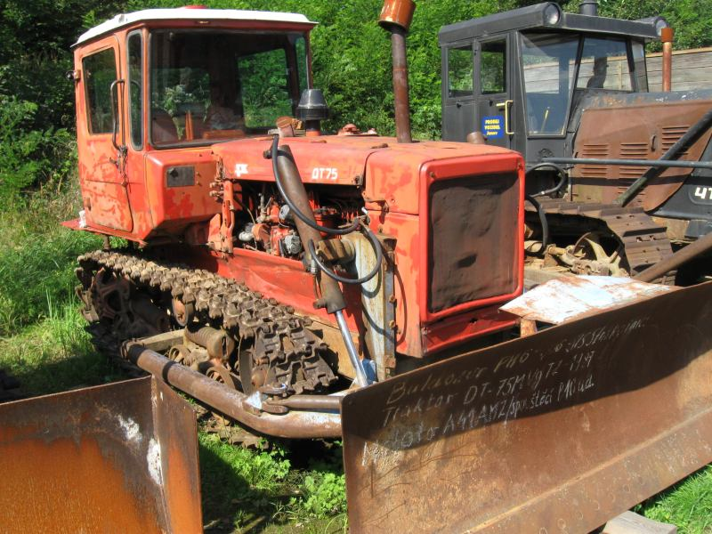 Pásový traktor DT-75